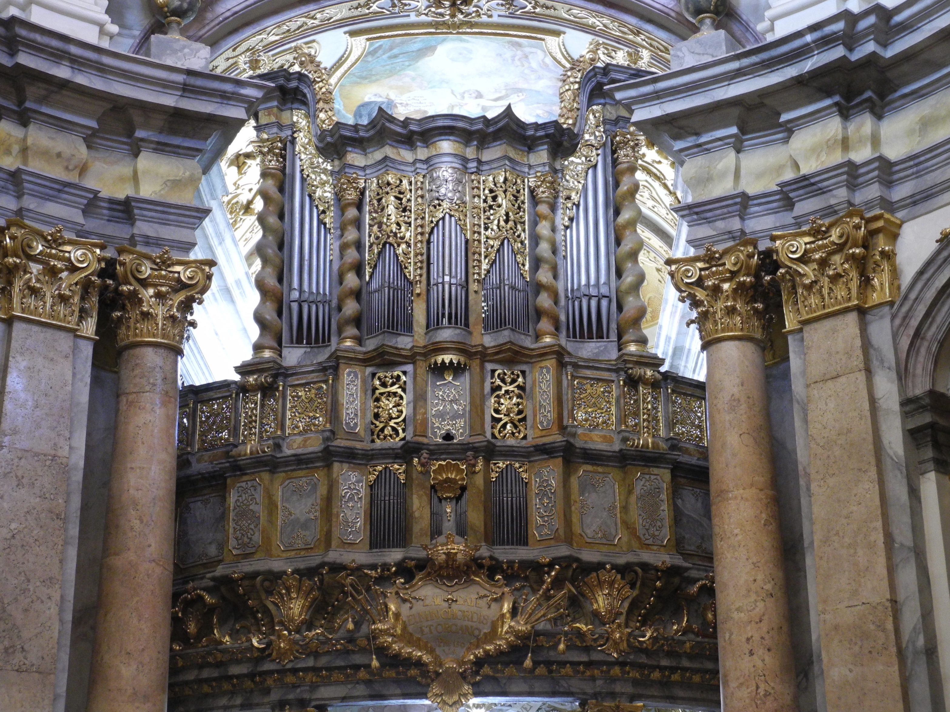 Brandenstein-Orgel im Kloster Weltenburg an der Donau 1728 (12/I/P)